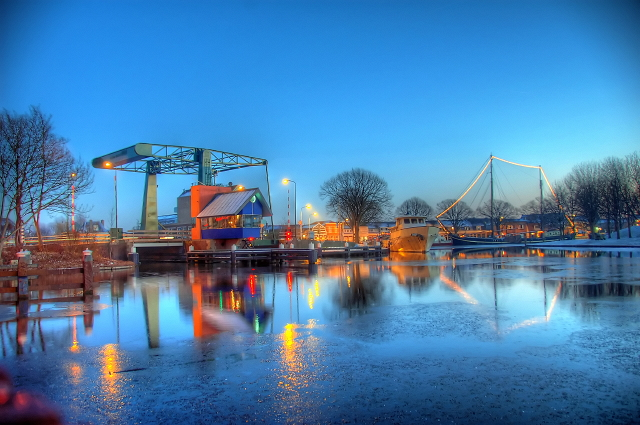 Schrijversbrug over de Oude Rijn bij de Zijlsingel